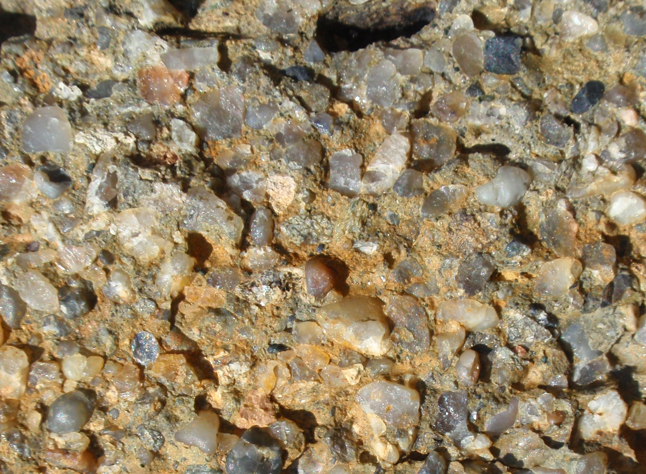 Гравеліт з піщанистим цементом. Фліш стрийської світи Скибових Карпат